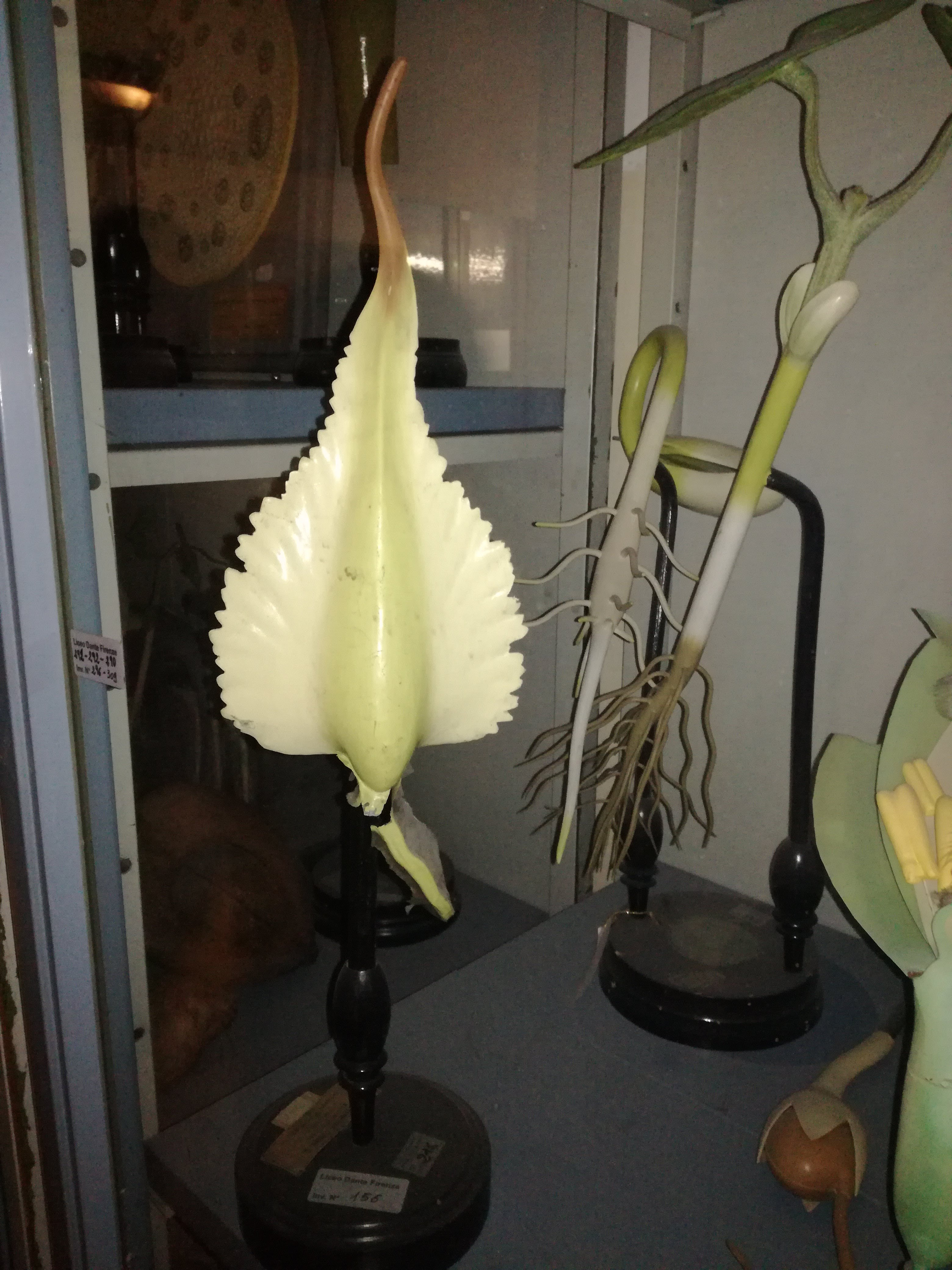 Modelli botanici della manifattura Brendel conservati al liceo ginnasio Dante di Firenze